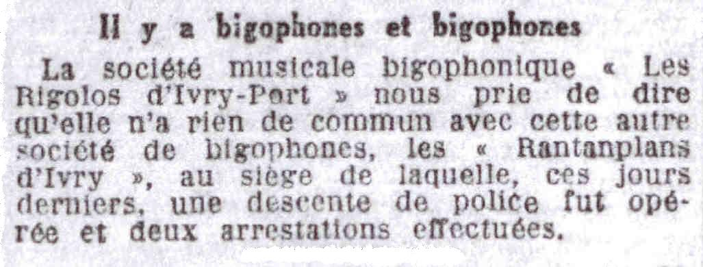 Annonce d'une société bigophonique